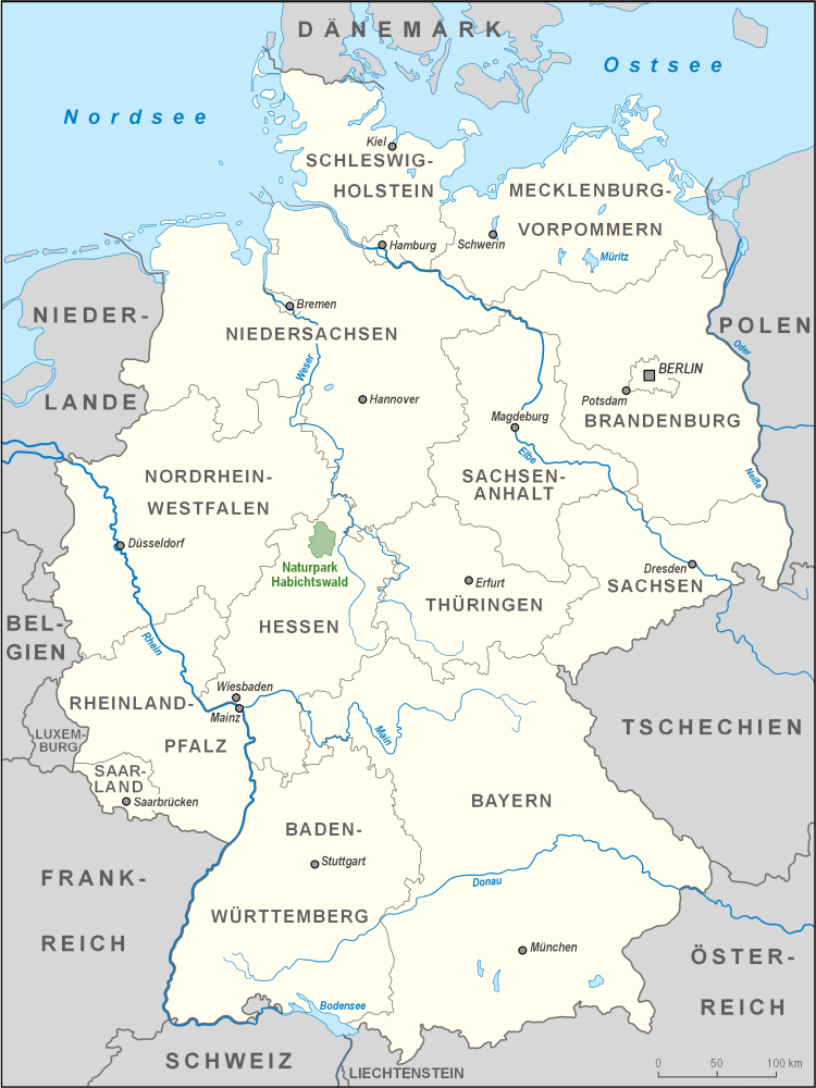 Karte des Naturparks Habichtswald in Deutschland